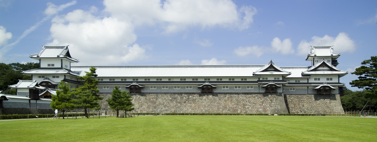 Kanazawa Castle, Kanazawa, Ishikawa Prefecture, Japan Gojikken Nagaya and yagura, Hashizumemon tsuzuki yagura